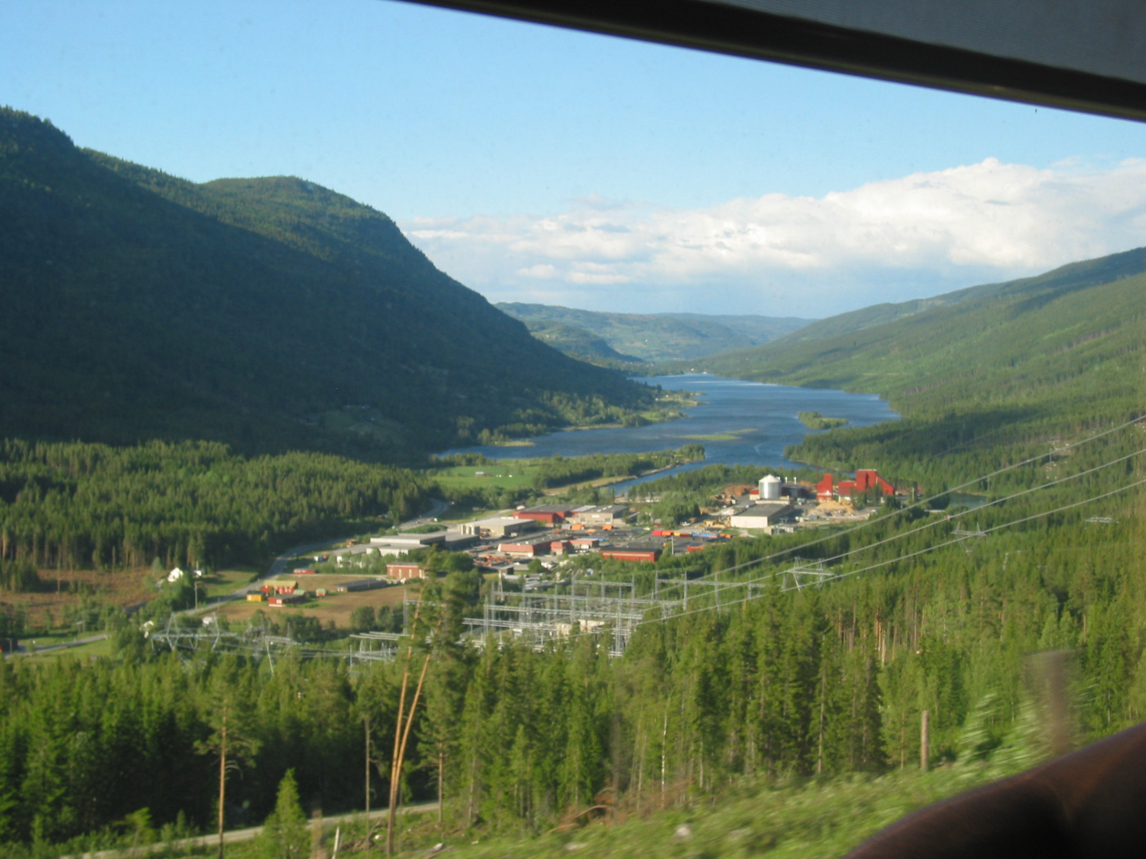 Kleivi næringspark ved vestenden av Strandafjorden. Biletet er teke frå Bergensbanen.